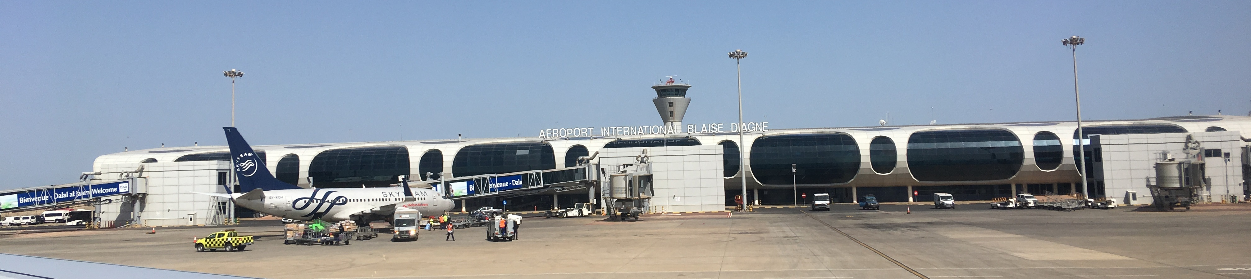 Vue de l'aérogare de l'aéroport international Blaise DIAGNE